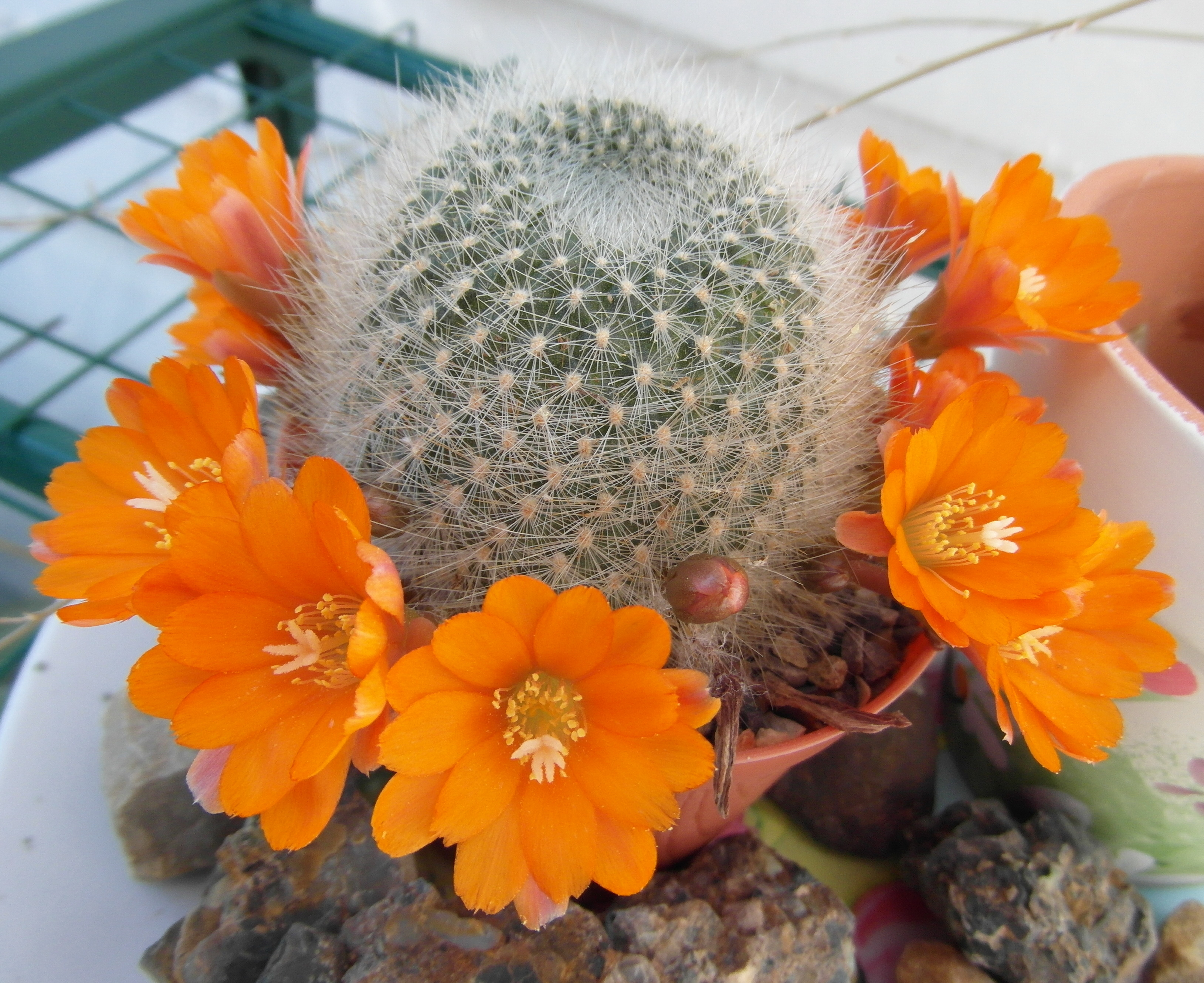 Rebutia fiebrigii